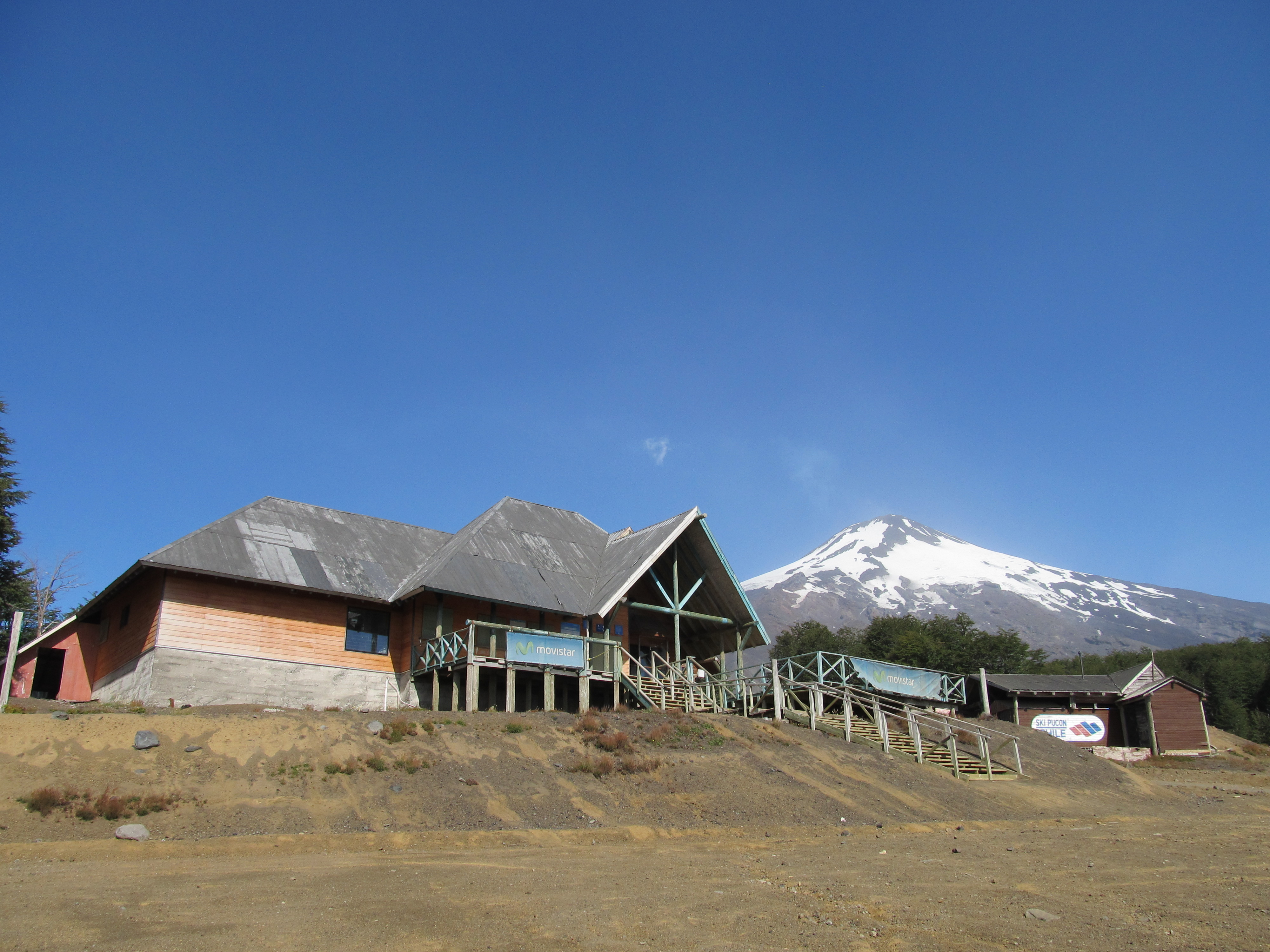 Refugio del centro de esquí Pucón en febrero.